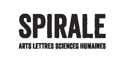 Voici le nouveau logo du magazine Spirale